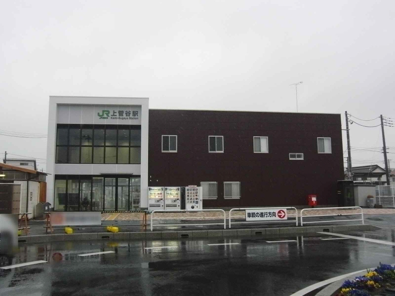 JR東日本の水郡線の上菅谷駅の駅舎の写真です。